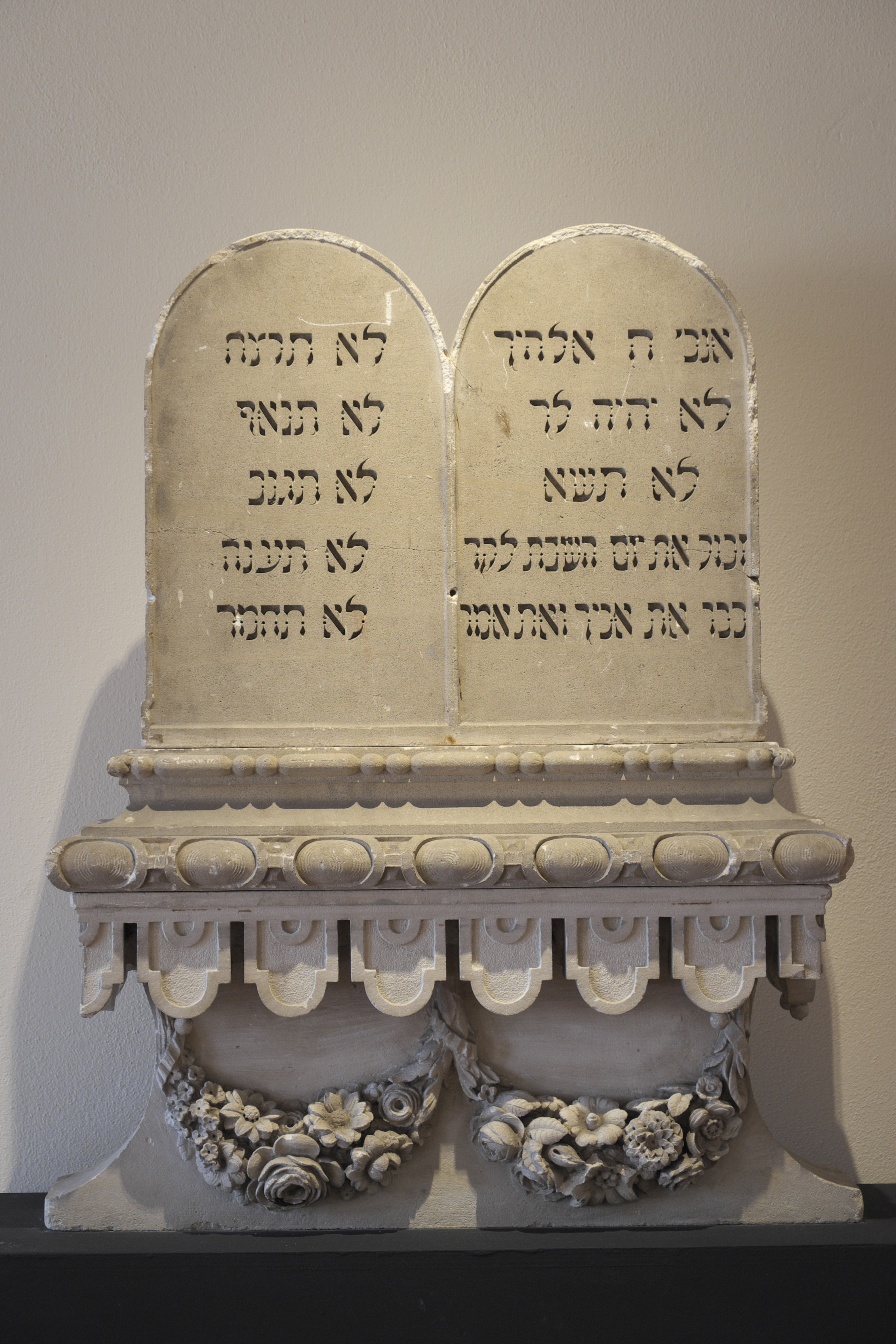 Musée de la Cour d'Or in Metz im Département Moselle (Region Alsace-Champagne-Ardenne-Lorraine/Frankreich), Gesetzestafeln, um 1865, aus der Synagoge von Fénétrange